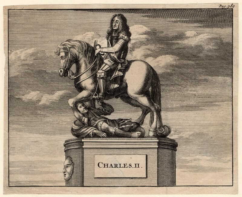 Gravure de la statue de Charles II et Oliver Cromwell